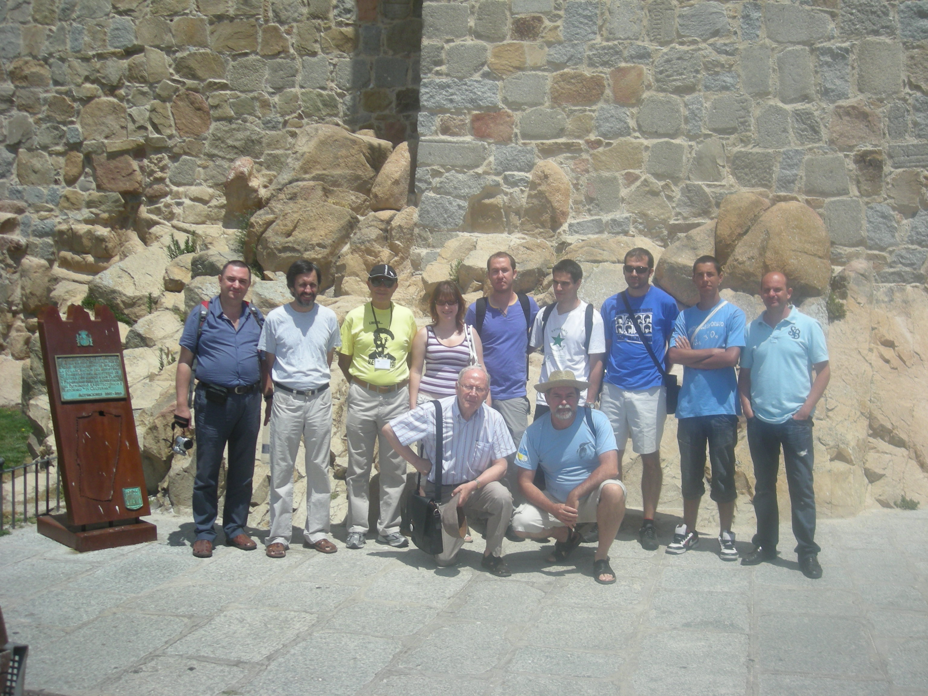 kongresanoj de la 70-a Hispana Kongreso de Esperanto antaŭ la Murego de Avilo